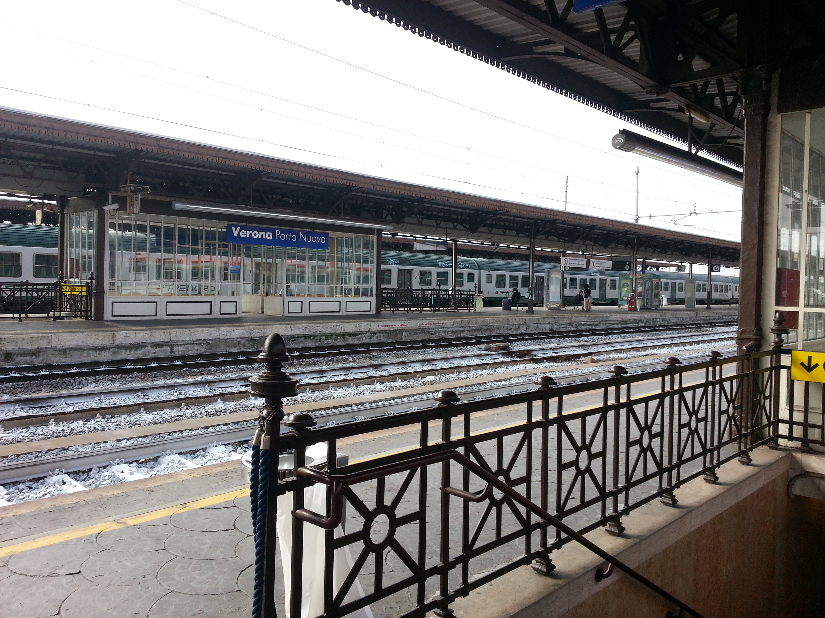 verona italia